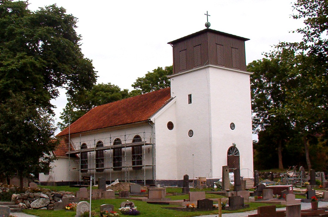 Date 2005